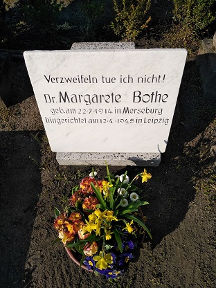 Grabstein mit Ergänzung 2020